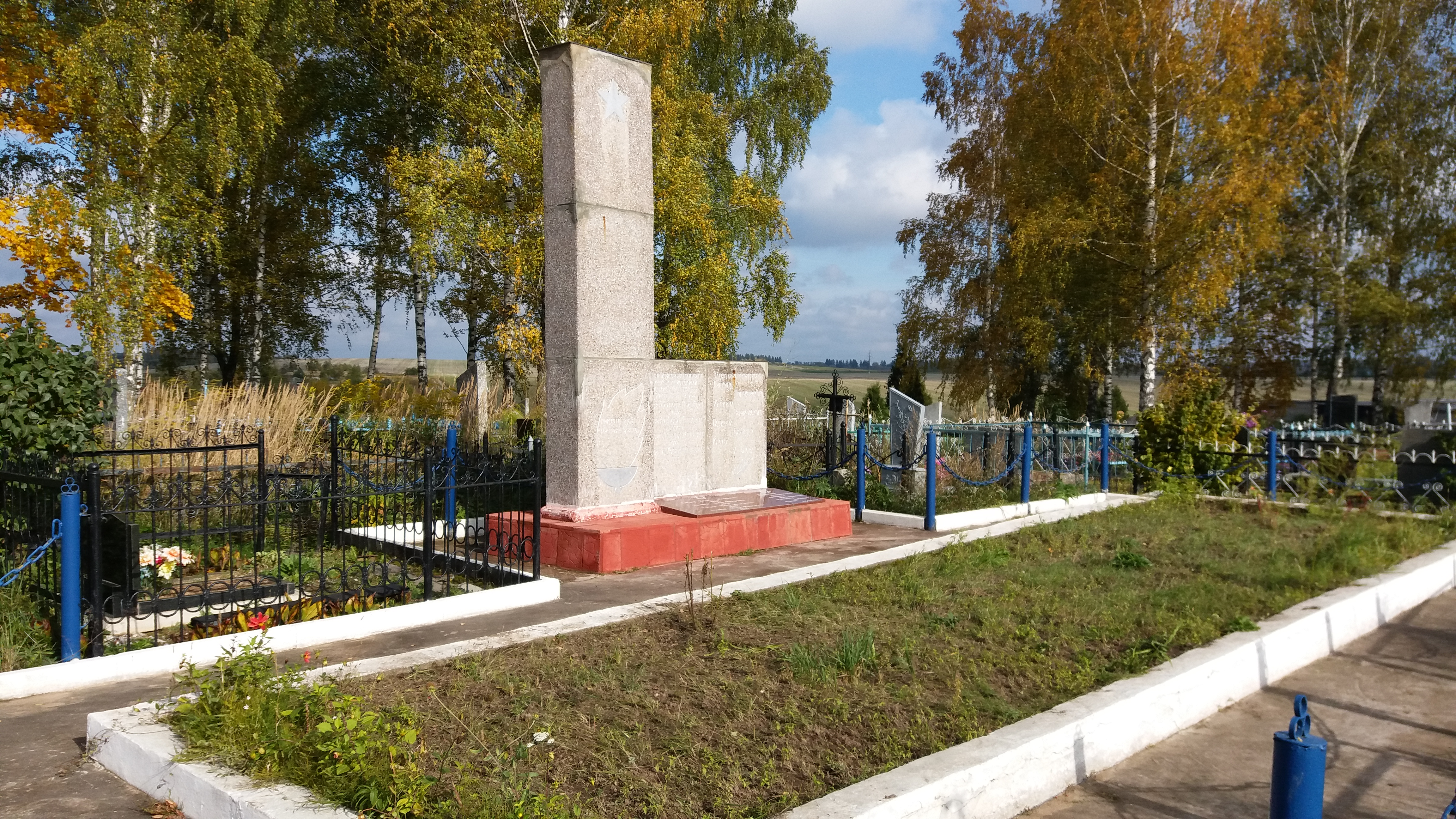 Памятник на месте убийства нацистами 8 апреля 1942 года евреев - узников гетто города Барань Оршанского района. Находится на территории городского кладбища недалеко от входа, в 300 метрах от улицы Сорокина.